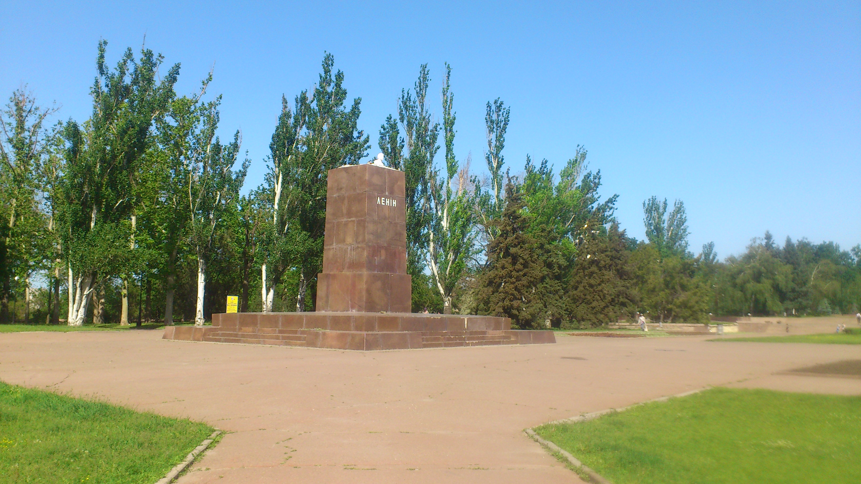 Миколаїв, площа Леніна травень 2014